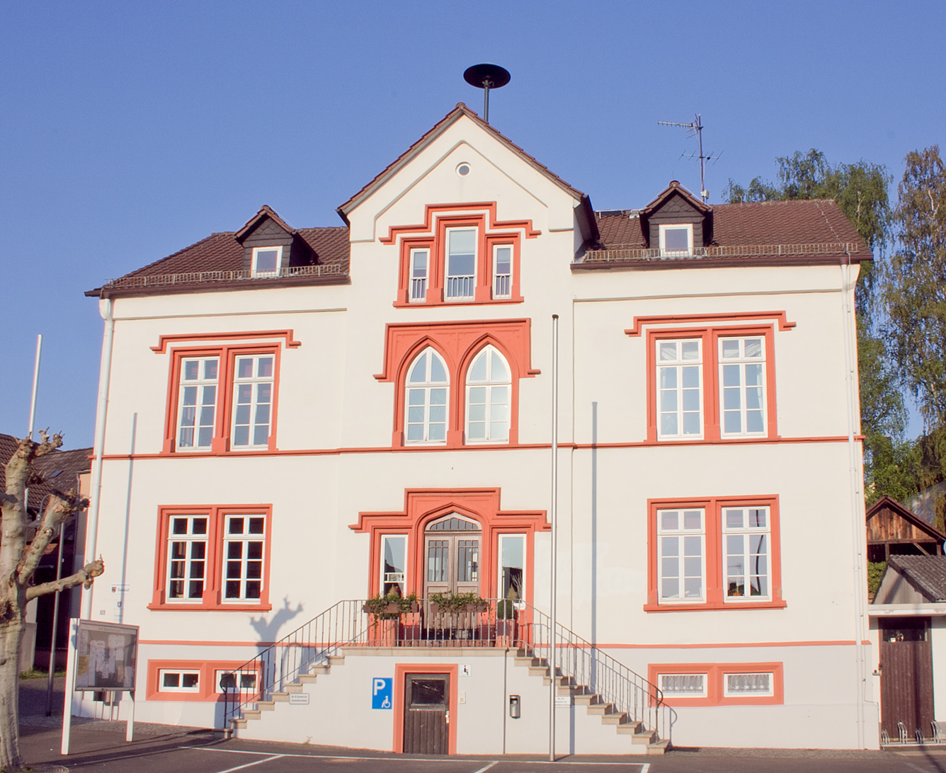 Rathaus in Ranstadt im Wetteraukreis, Deutschland.